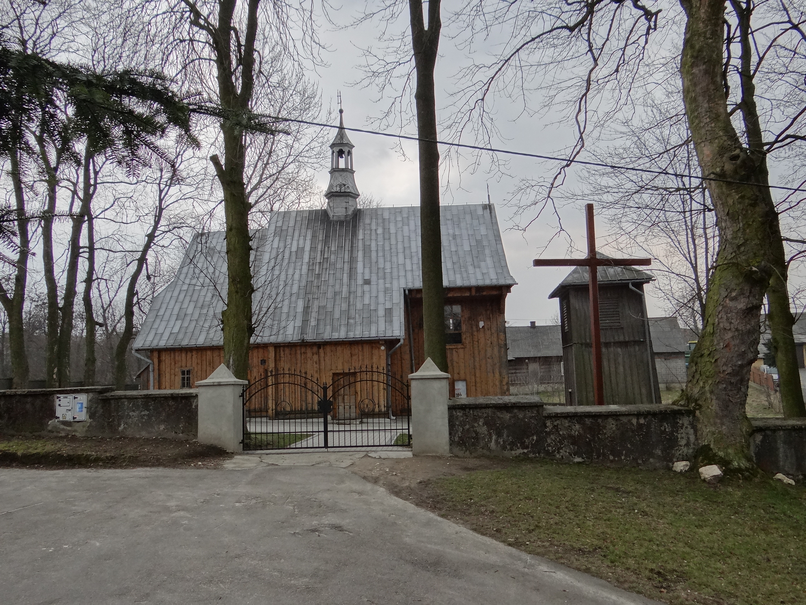 Ulina Wielka - zespół kościoła parafialnego: rzymskokatolicki kościół parafialny pw. św. Katarzyny, 1655 i dzwonnica, XVIII/XIX